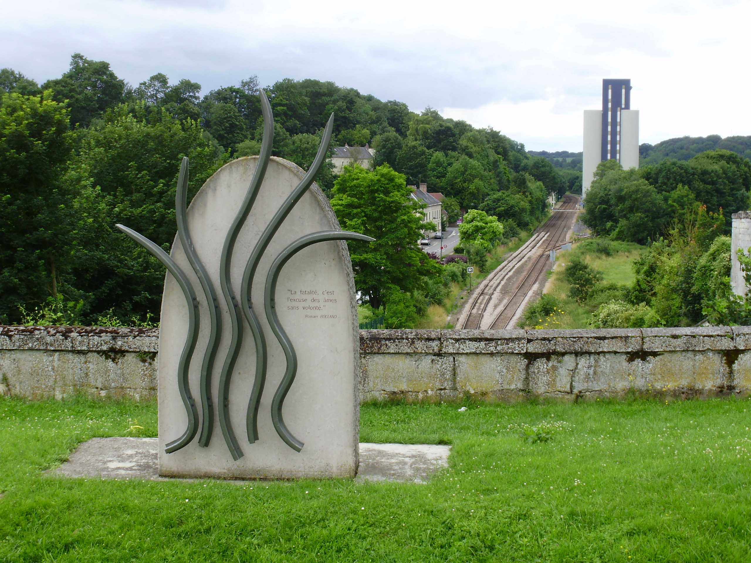 Tunnel de Vierzy, Aisne, France : monument en souvenir des victimes de l'effondrement du tunnel survenu le 16 juin 1972, au-dessus de son entrée sud-ouest. La gare de Vierzy est à l'arrière-plan à hauteur du silo.